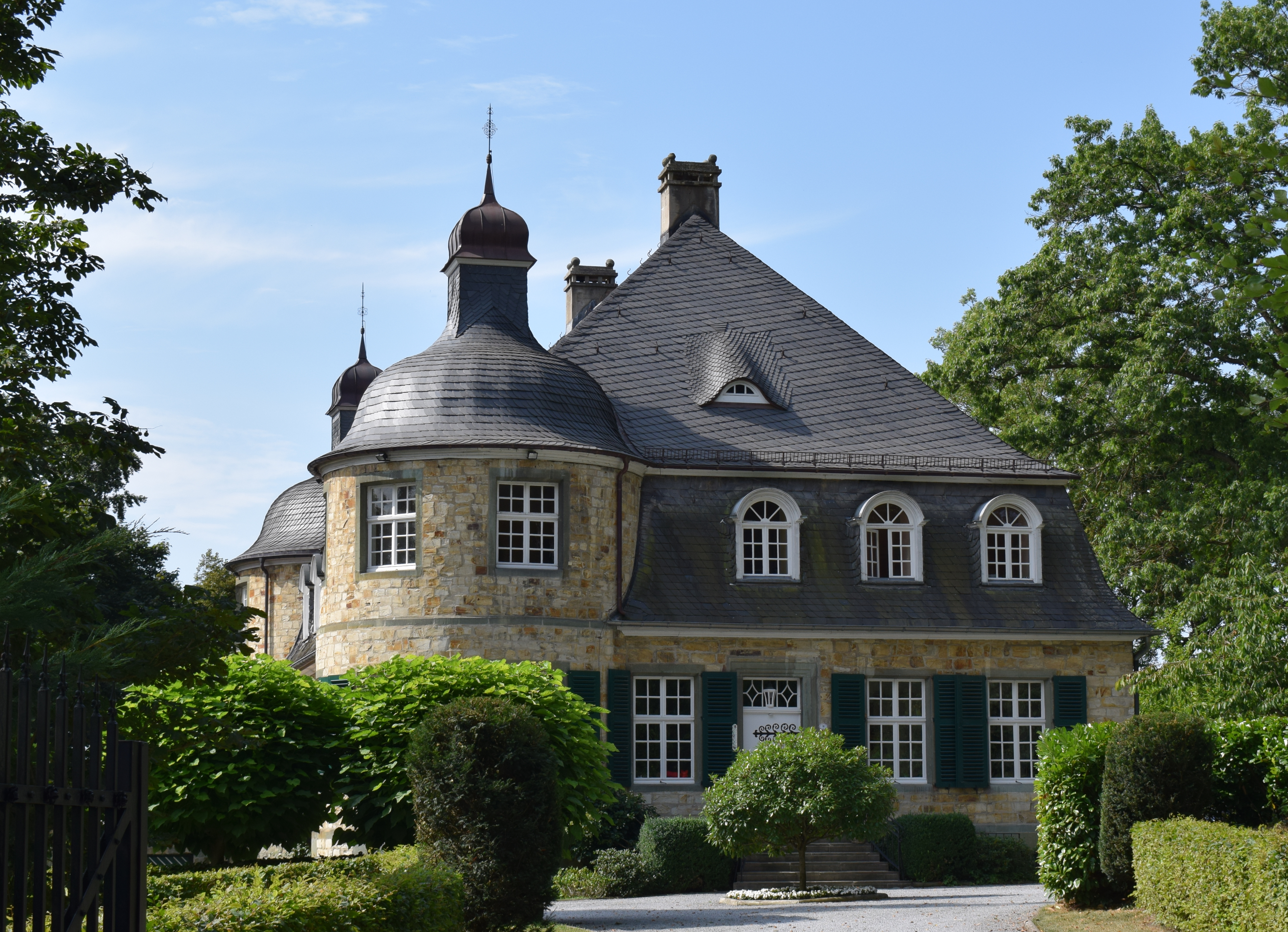 Herrenhaus auf dem ehemaligen Gut Graffeln bei (Büren-) Wewelsburg, Westfalen